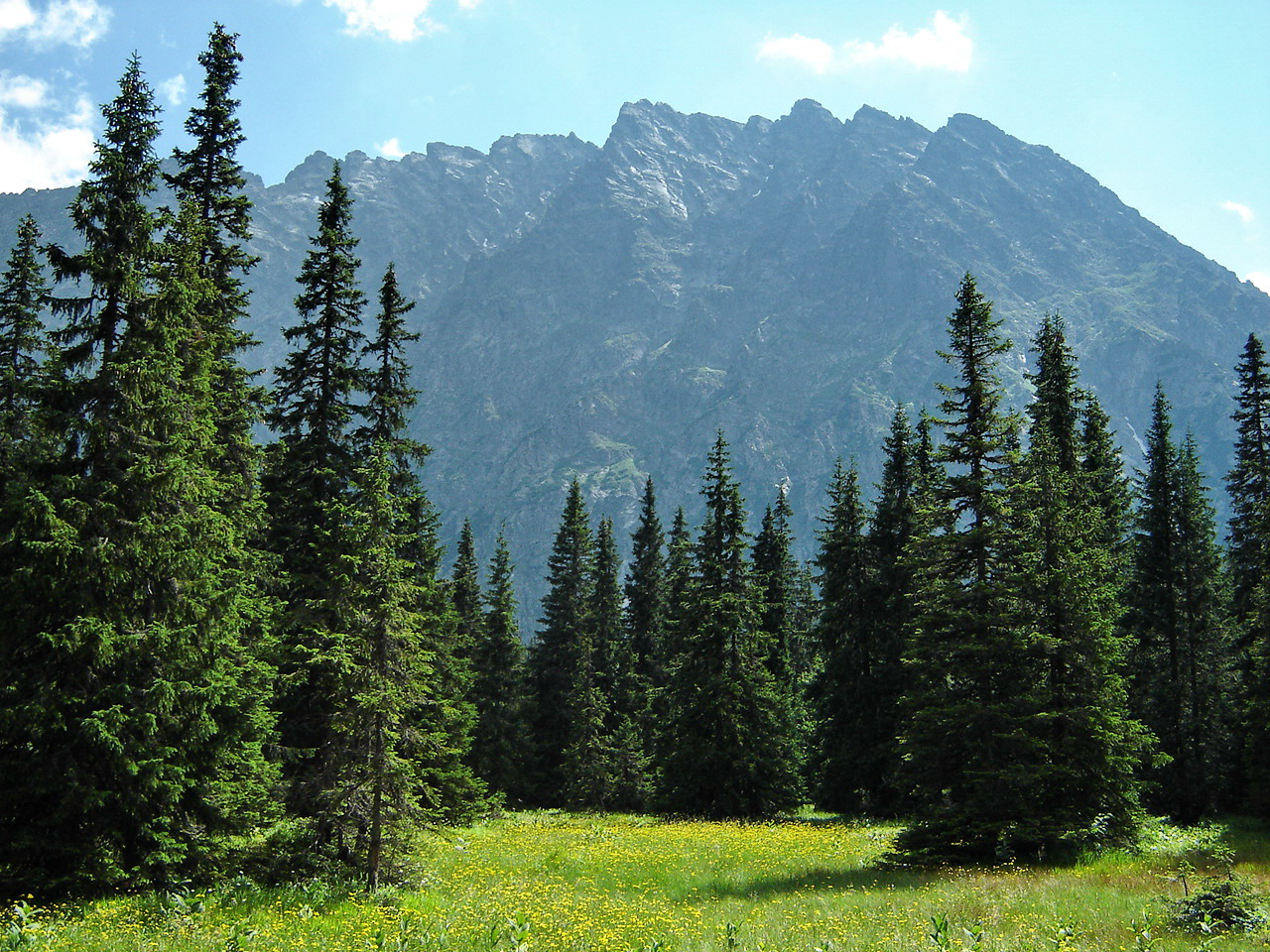 Kôprová dolina, rázcestie pod Temnými Smrečinami